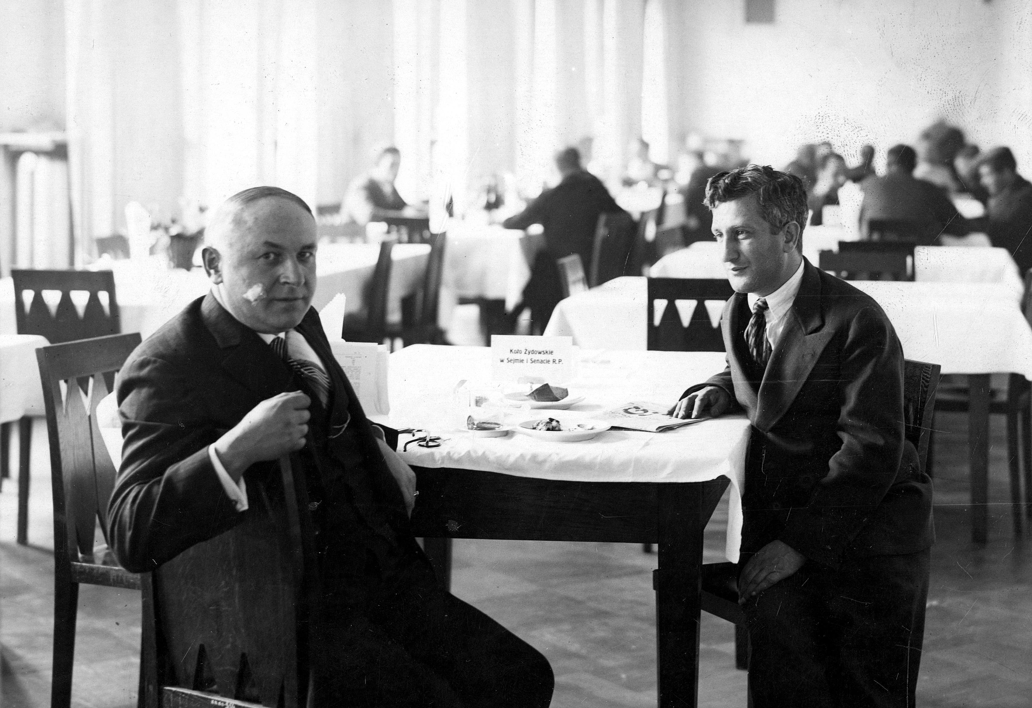 Sejm w okresie przesilenia gabinetowego w 1929 roku, Koło Żydowskie. Posłowie w bufecie sejmowym w przeddzień otwarcia sesji sejmowej. Widoczny Leon Reich (z lewej) i dziennikarz żydowski Bernard Singer.